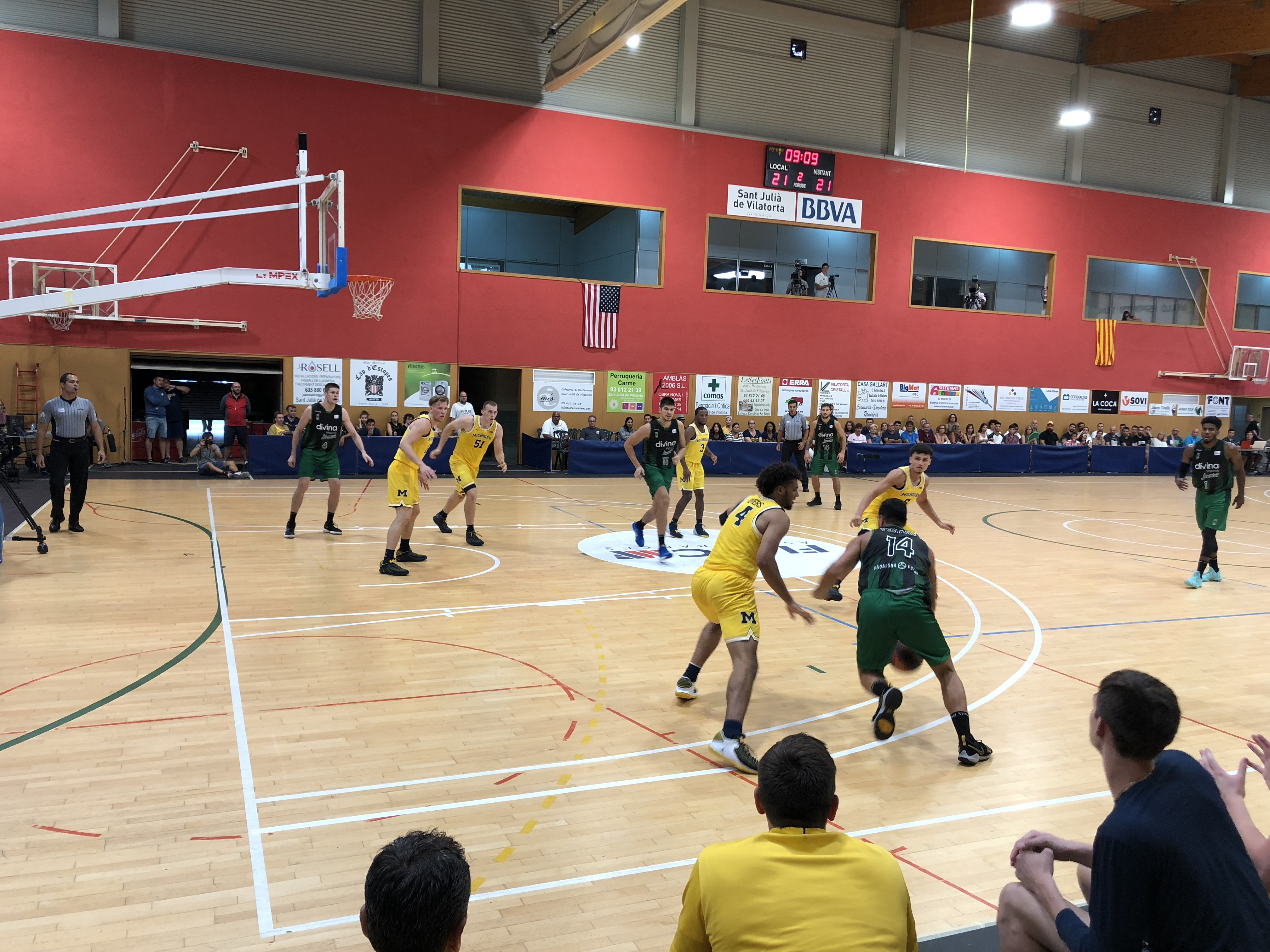 Primer partit del Joventut de Badalona de la pretemporada 2018-19, disputat davant la Universitat de Michigan a Sant Julià de Vilatorta